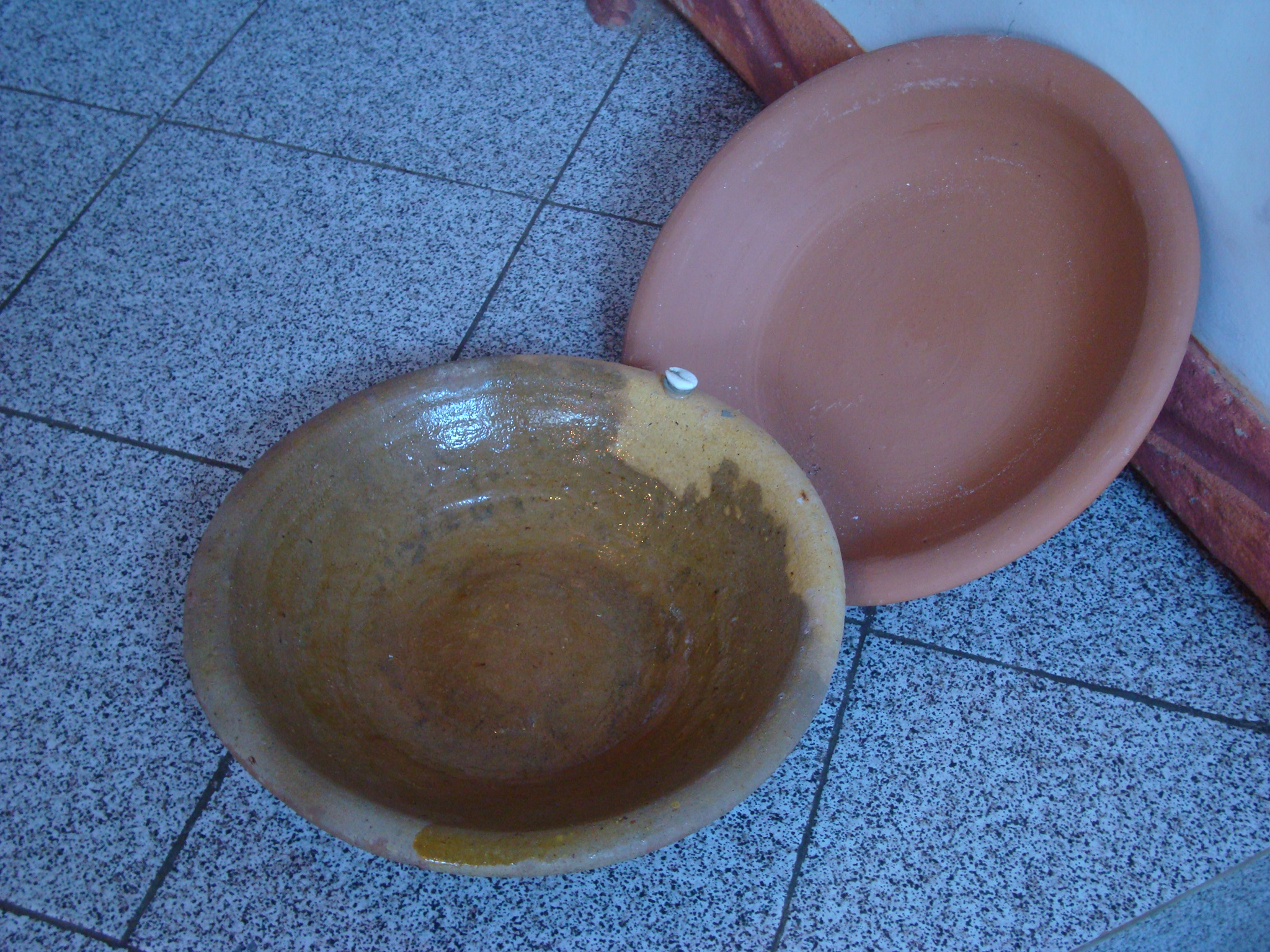 Alquidá ou aguidá. Utensílio culinario.